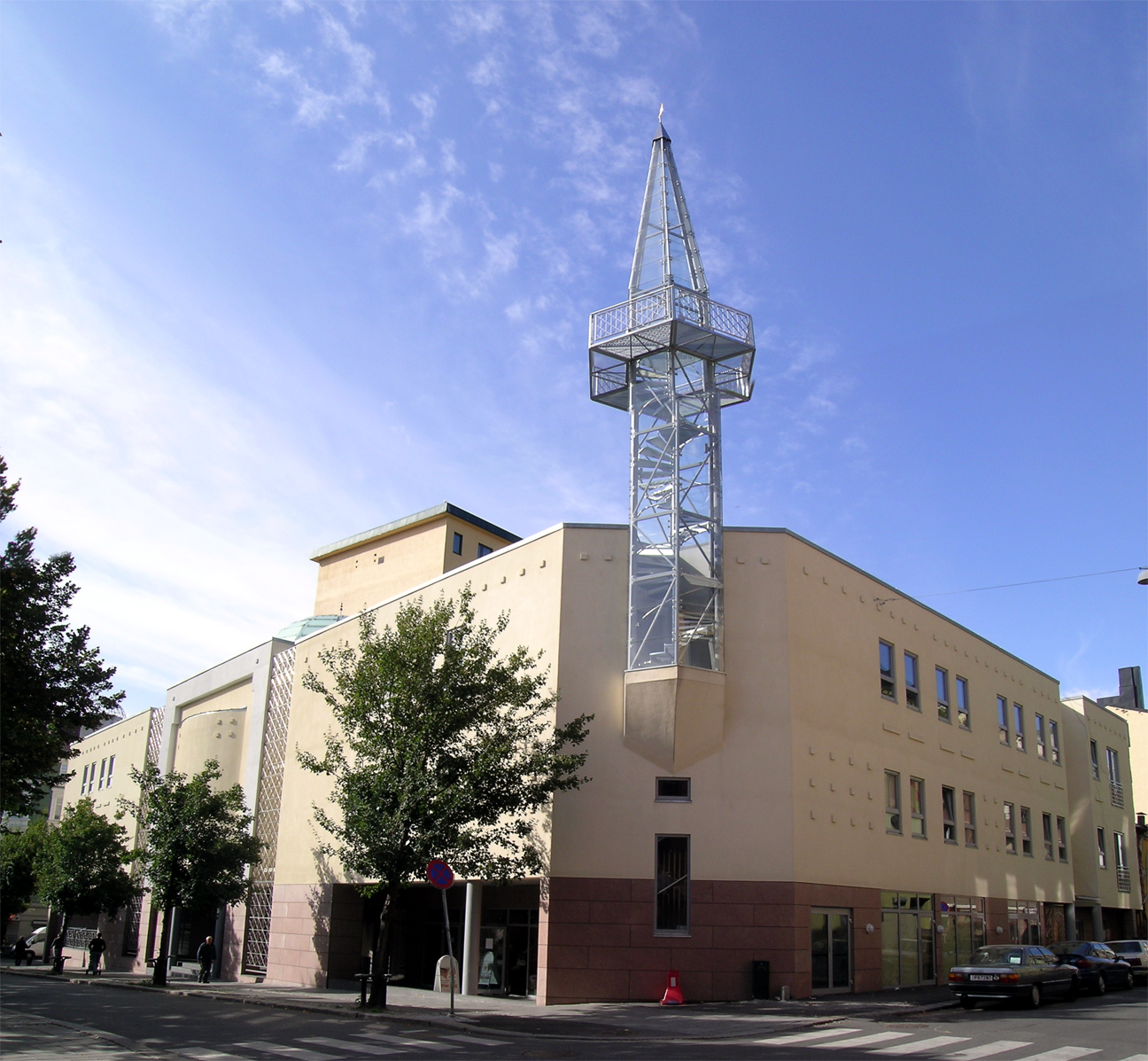 Urtehagen moske, Urtegata, Oslo.